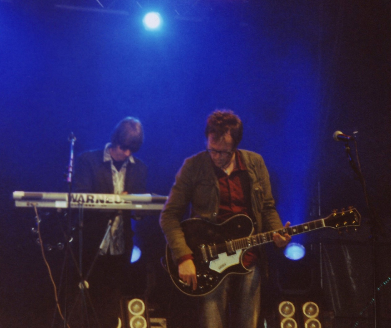 Die Band Fehlfarben beim Open-Air-Konzert „Seegeflüster“ in Hagen – Keyboarder Frank Fenstermacher (links) und Gitarrist Thomas Schwebel (rechts).